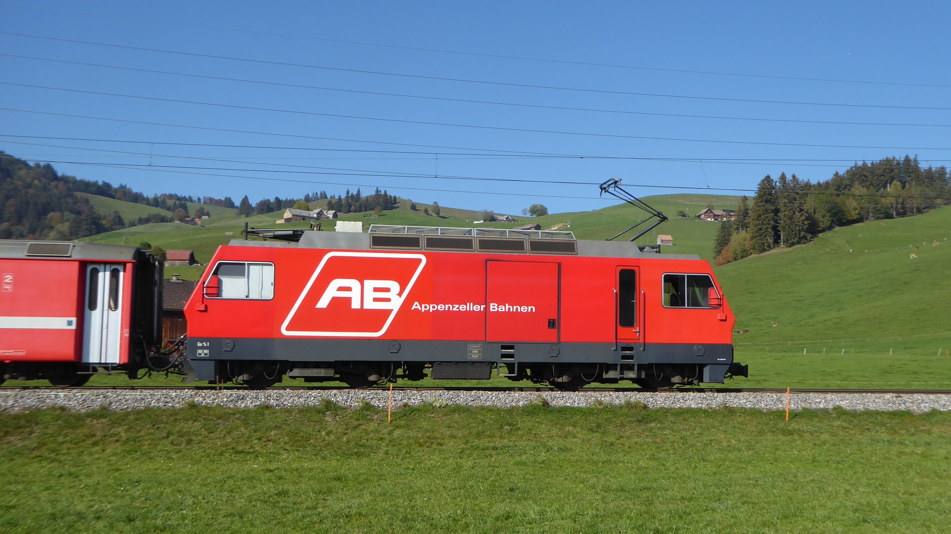 Ge 4/4 der Appenzeller Bahnen (AB) bei Gonten